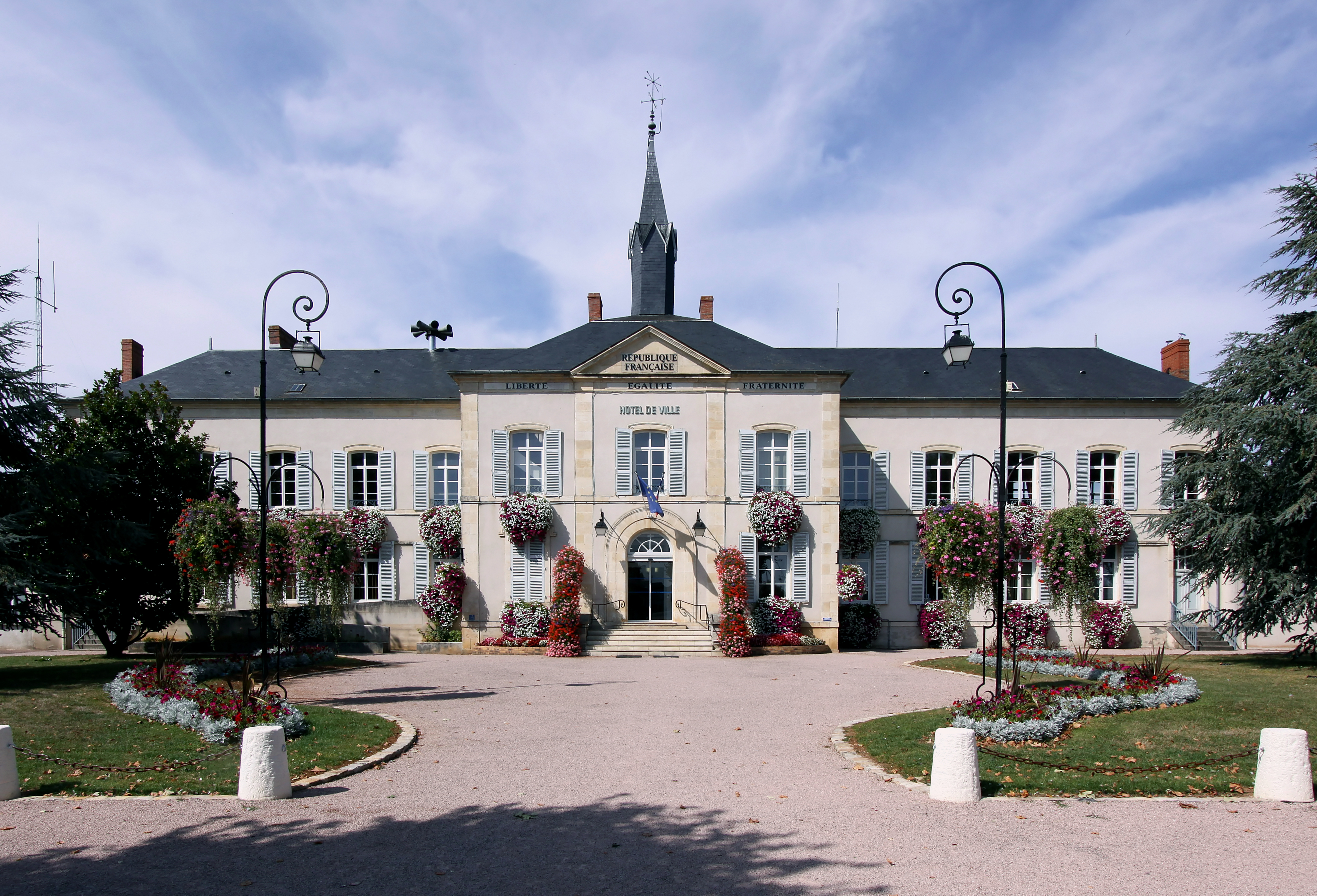 Rathaus von Dun-sur-Auron